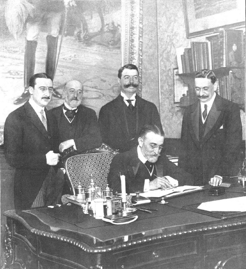 Fotografía que muestra al embajador de Francia en España, señor Geoffray, en el momento de firmar el Tratado franco español de 1912 por el que se creaba el Protectorado español de Marruecos. De pie a la derecha de la imagen está el ministro de Estado de España Manuel García Prieto. También están presentes el subsecretario González Hontoria, el jefe de Protocolo del Ministerio señor Heredia y el consejero de la Embajada francesa señor Vieuguet.